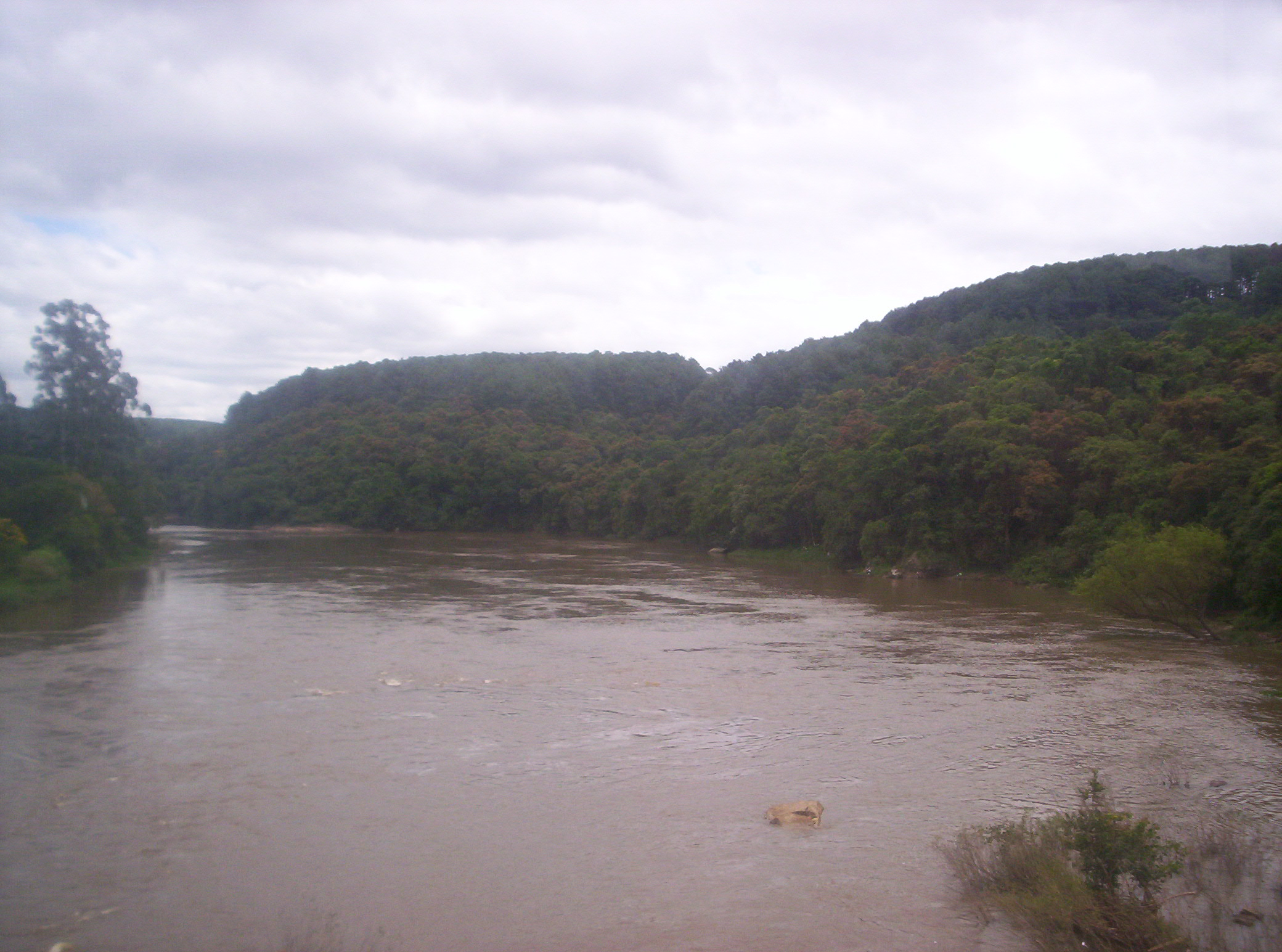 SOBRE PONTE TIBAGI - TB